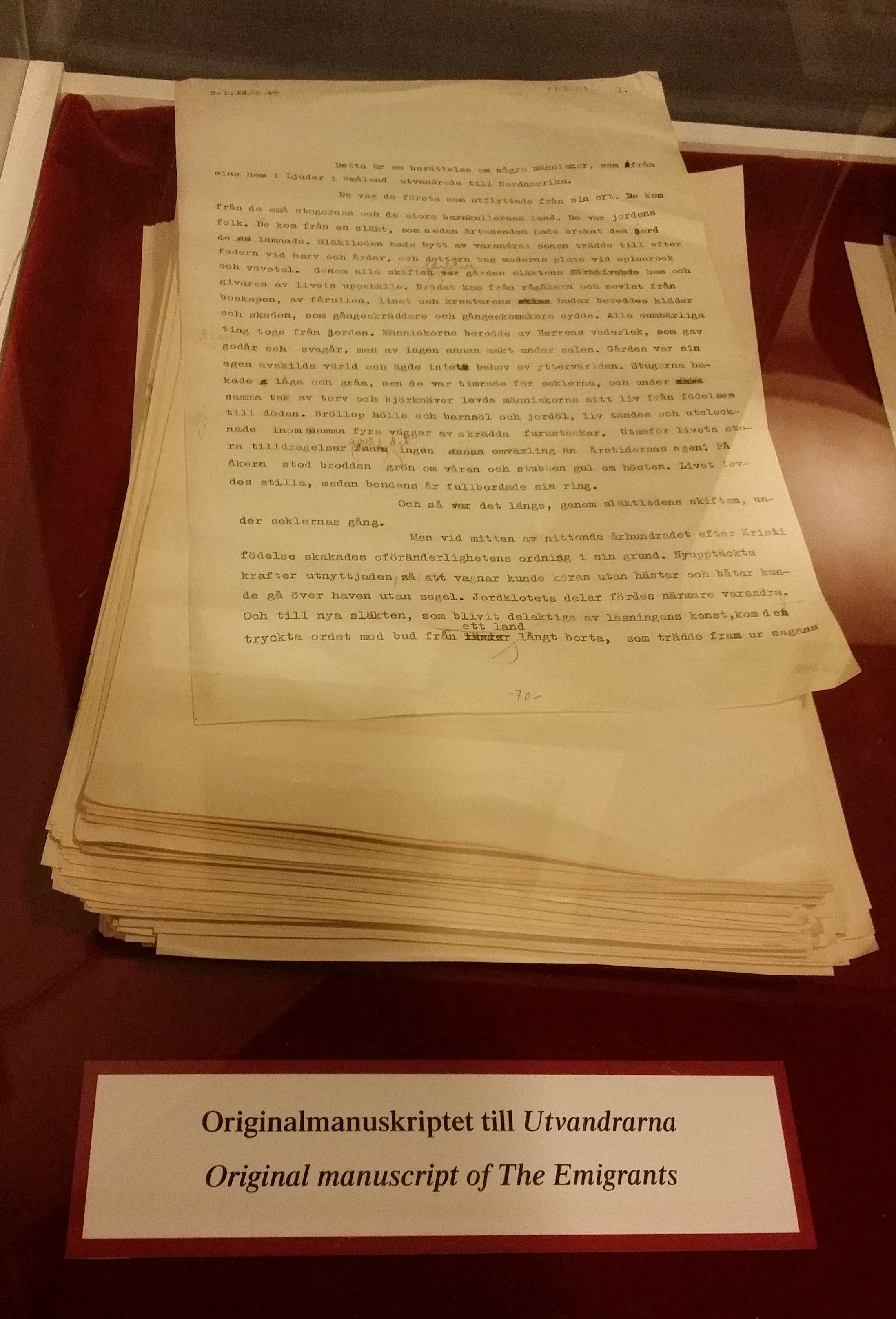 Originalmanuskriptet till "Utvandrarna" (1949).